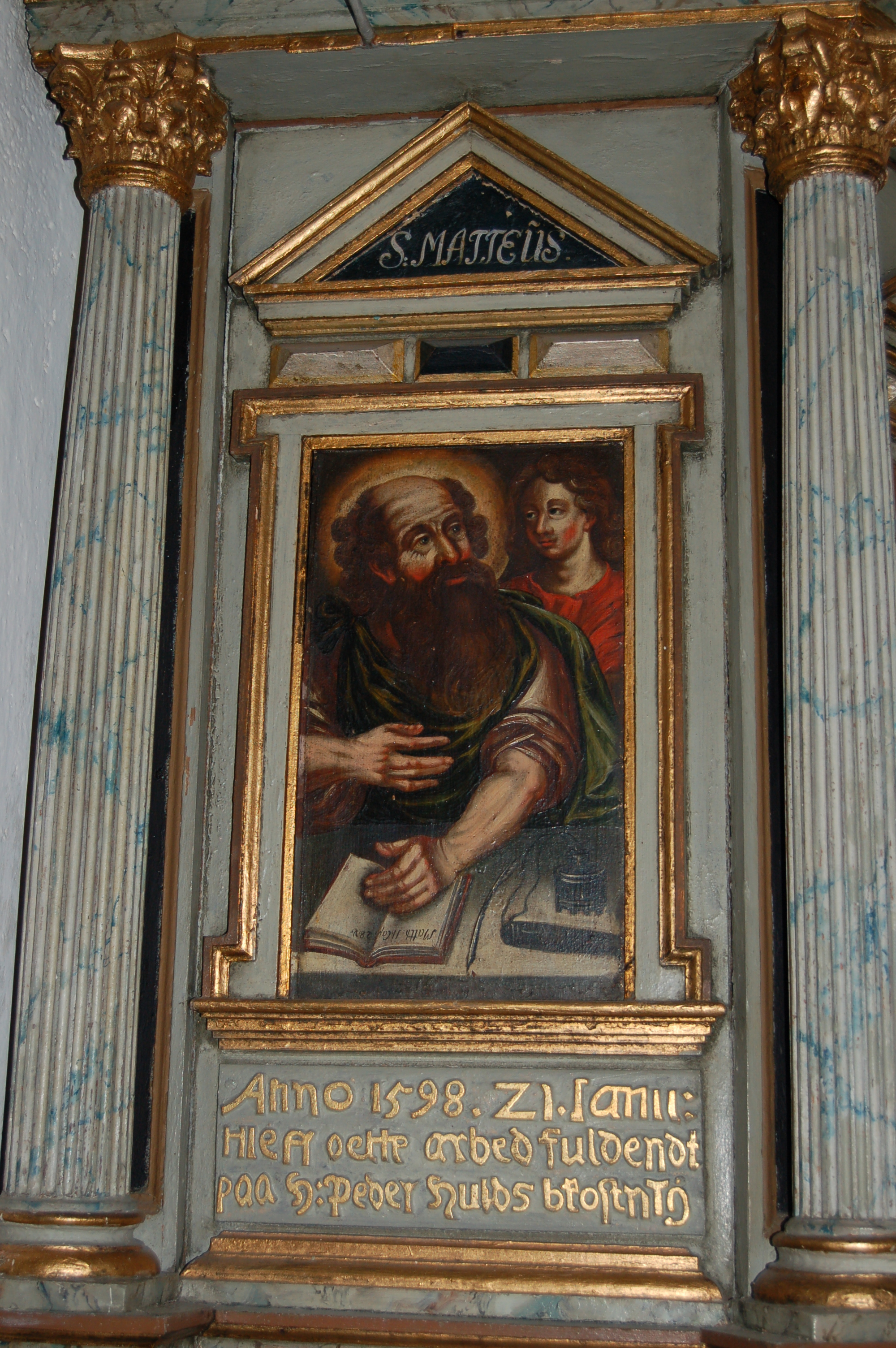 Prekestolen Tjølling kirke, Larvik - evangelisten Matteus Anno 1598